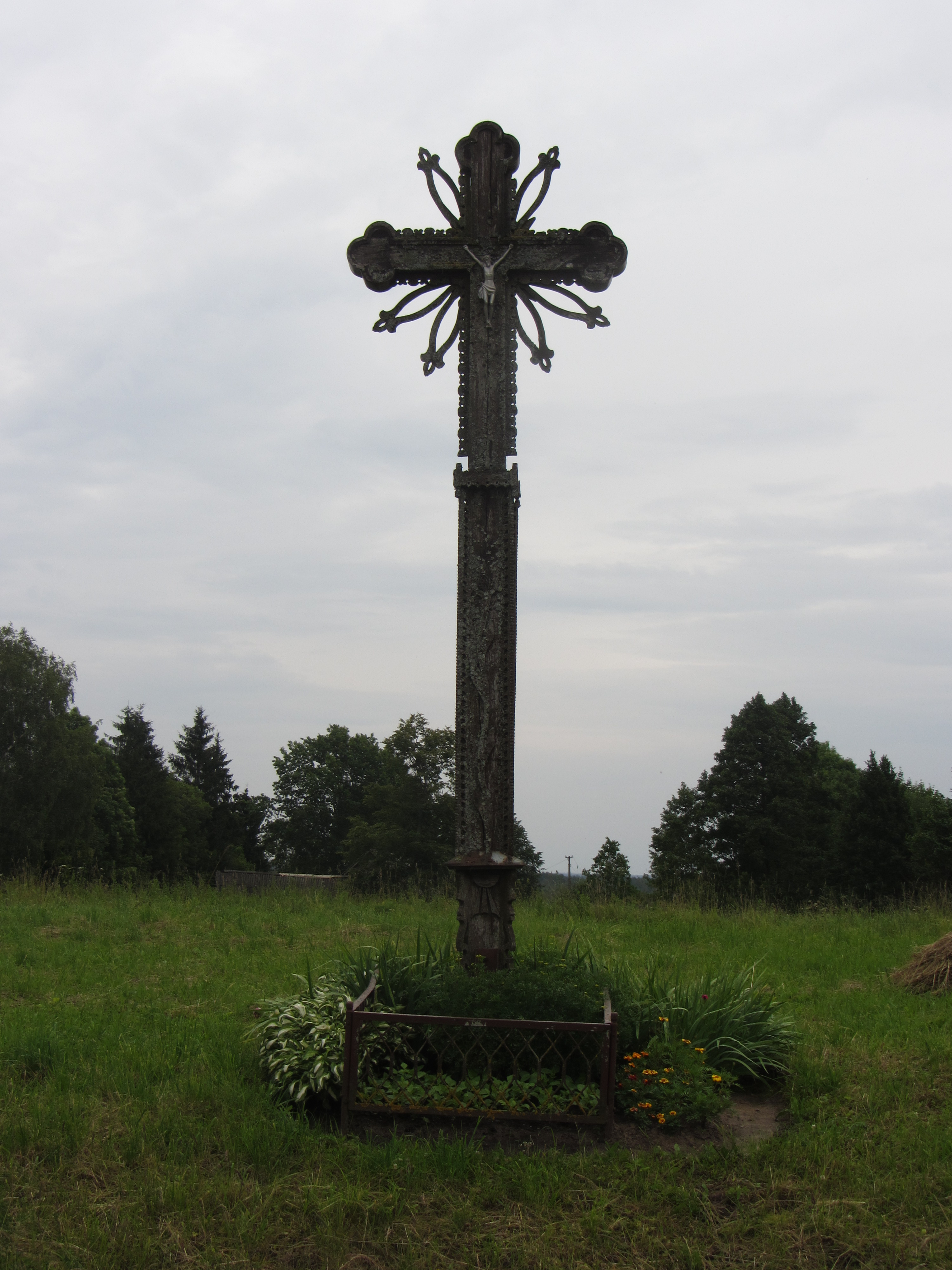 Tauragnų sen., Lithuania